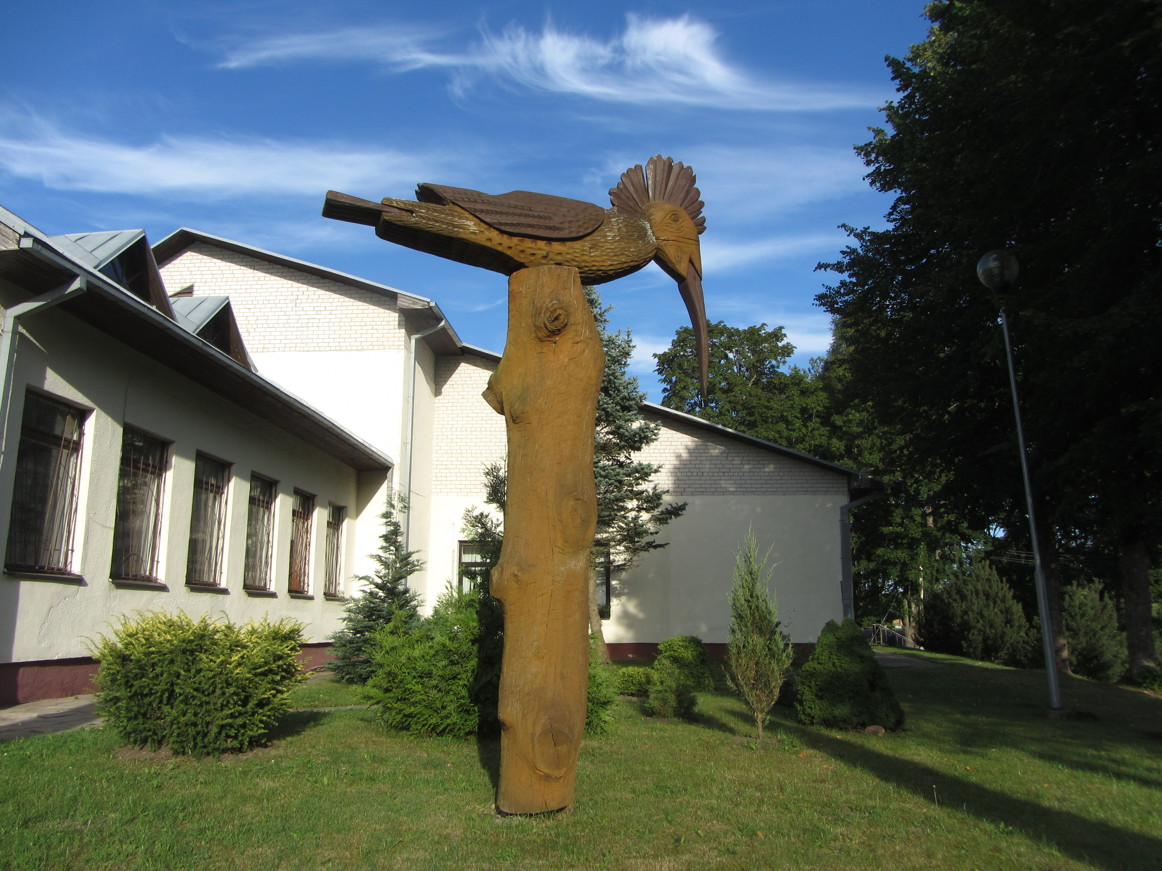 Kuktiškės, Lithuania